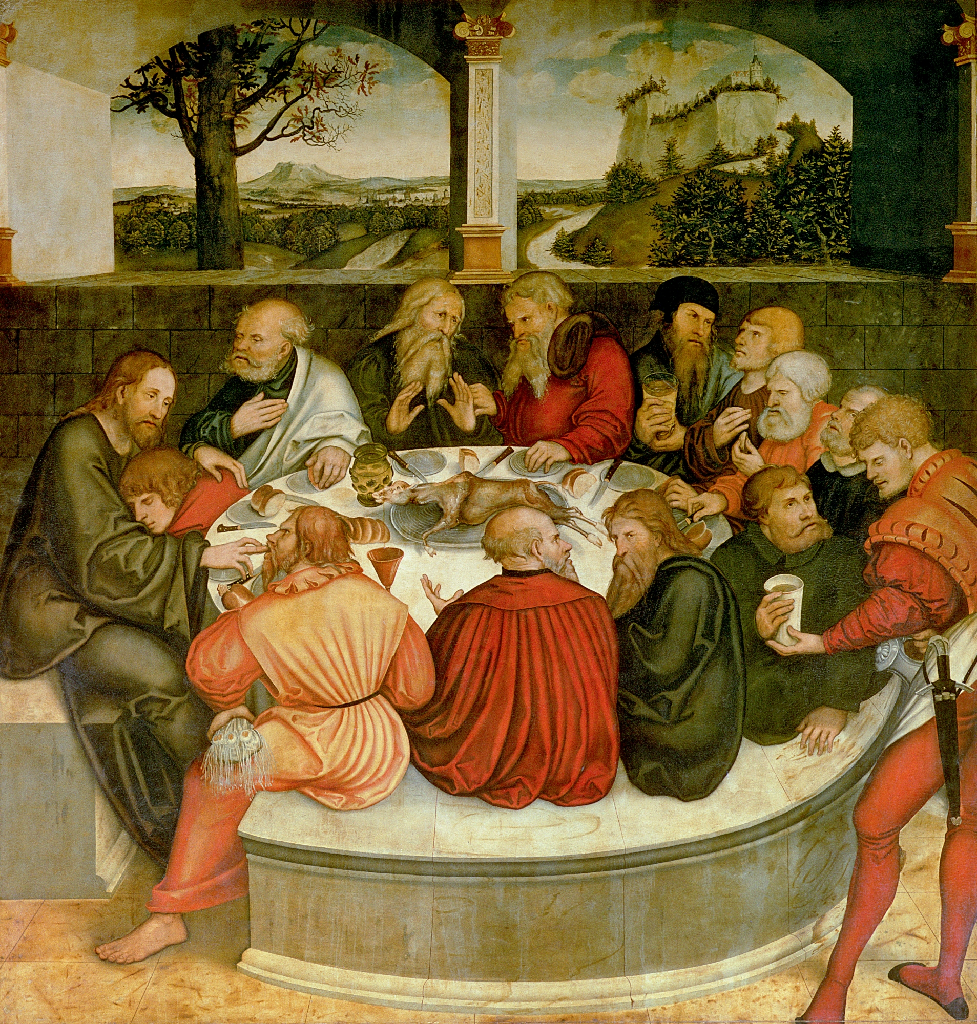 Reformation altarpiece, Stadt- und Pfarrkirche St. Marien zu Wittenberg, central panel